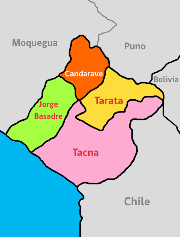 Las Provincias del Departamento de Tacna.